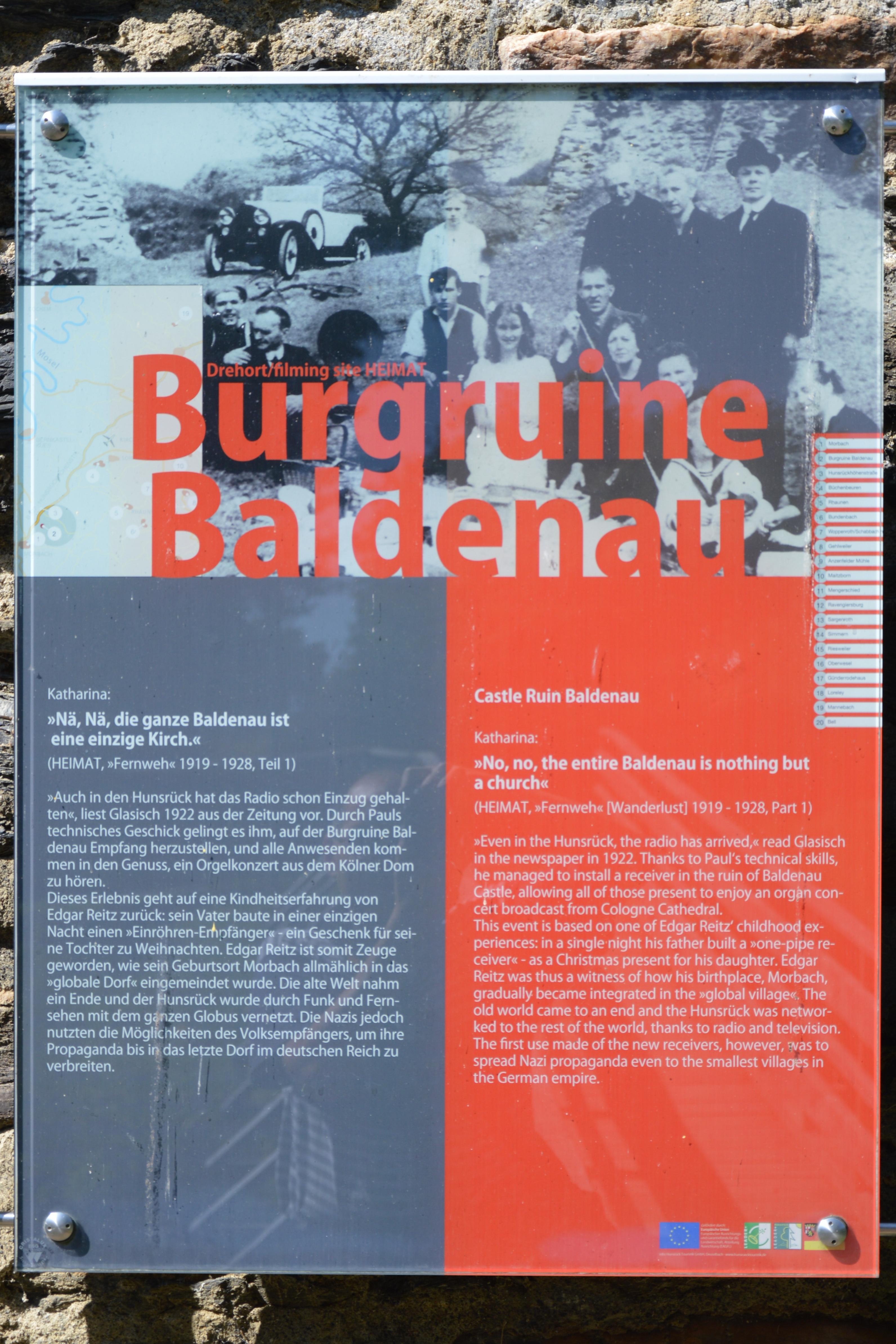 Burg Baldenau